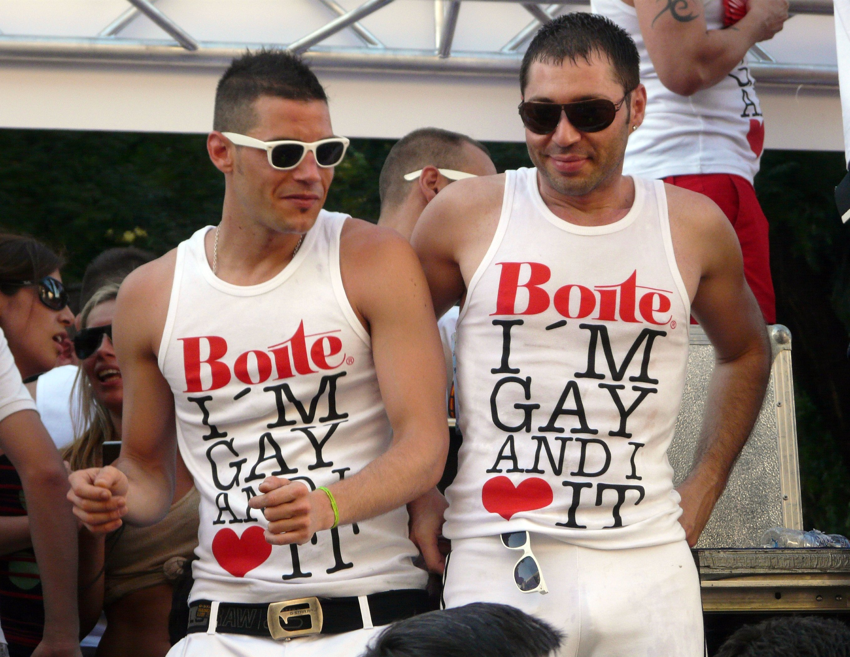 Durante la manifestaci�n/ desfile del d�a del Orgullo gay en Madrid, 5 julio 2008. Llegu� tarde para fotear la parte reivindicativa.